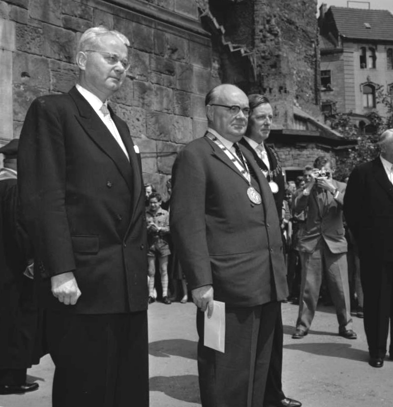 Verleihung des Karlspreises der Stadt Aachen an Paul Henri Spaak im Krönungssaal des Rathauses